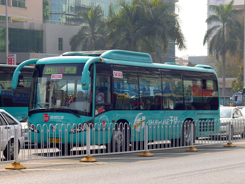 中文（中国大陆）: 深圳公交M376路宇通客车ZK6926HGA（中南第二批次）